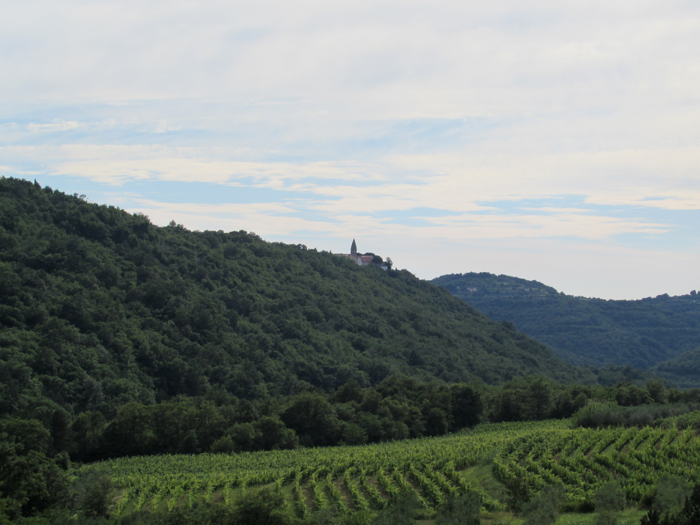 padna, slowenien